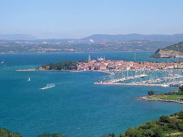 Izola